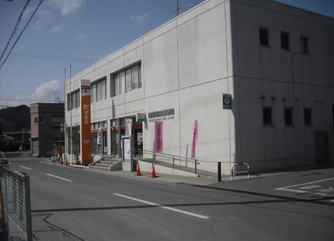 2010年7月15日 撮影